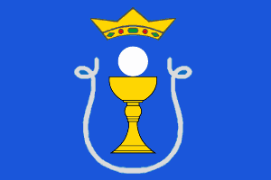 Bandera del Ayuntamiento de Cambados